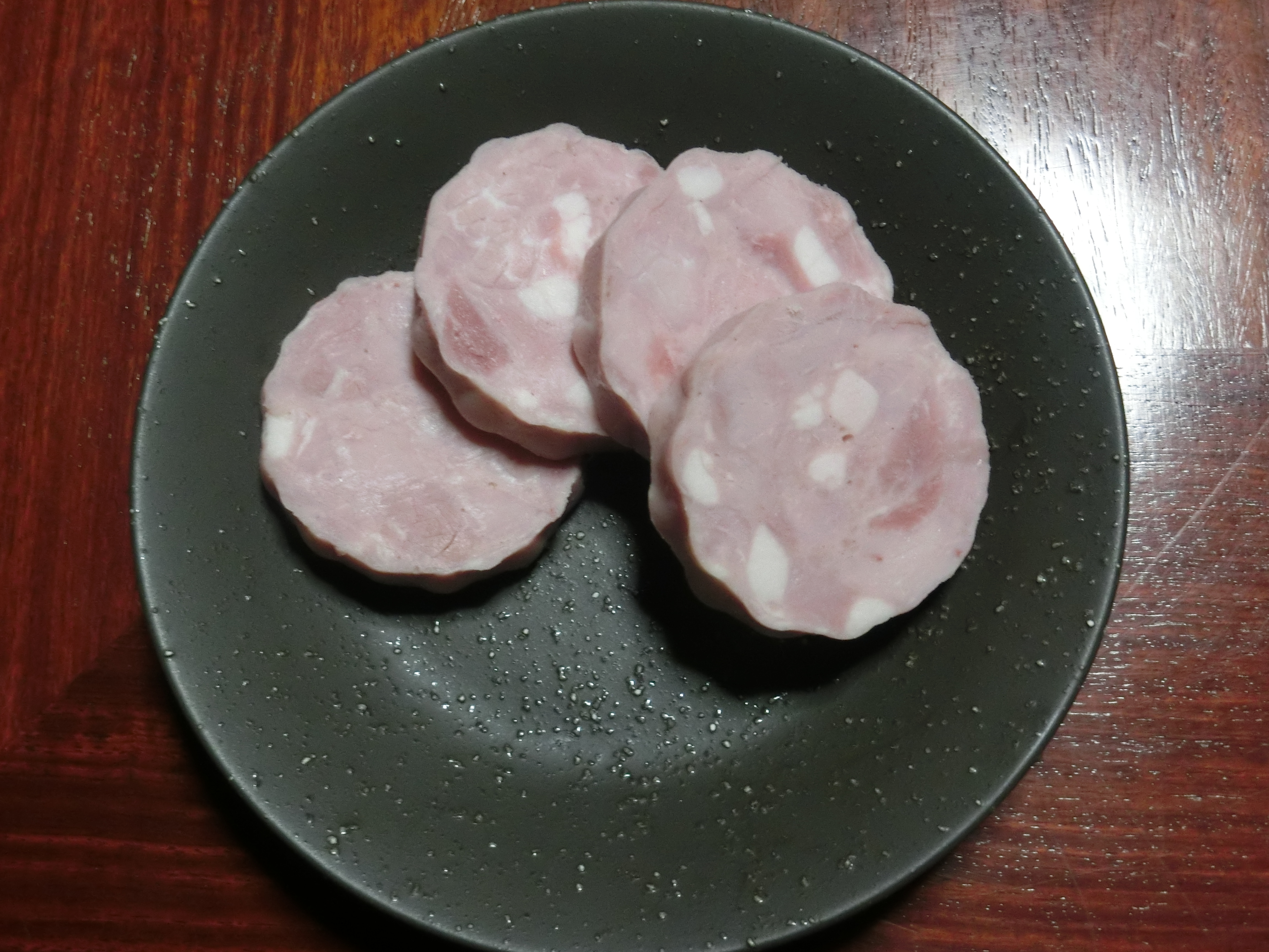 郡上市特産品 明宝ハム